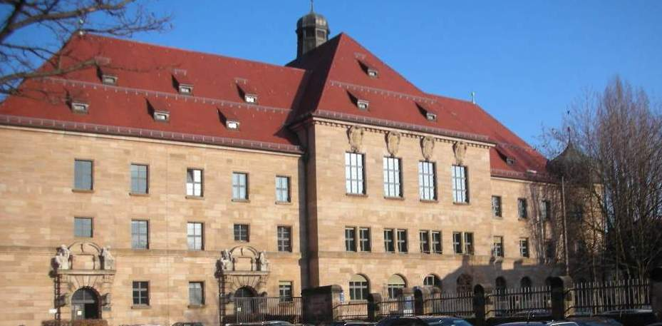 Justizpalast Nürnberg, Schauplatz der Nürnberger Prozesse 1945–49, aufgenommen im Jahr 2007